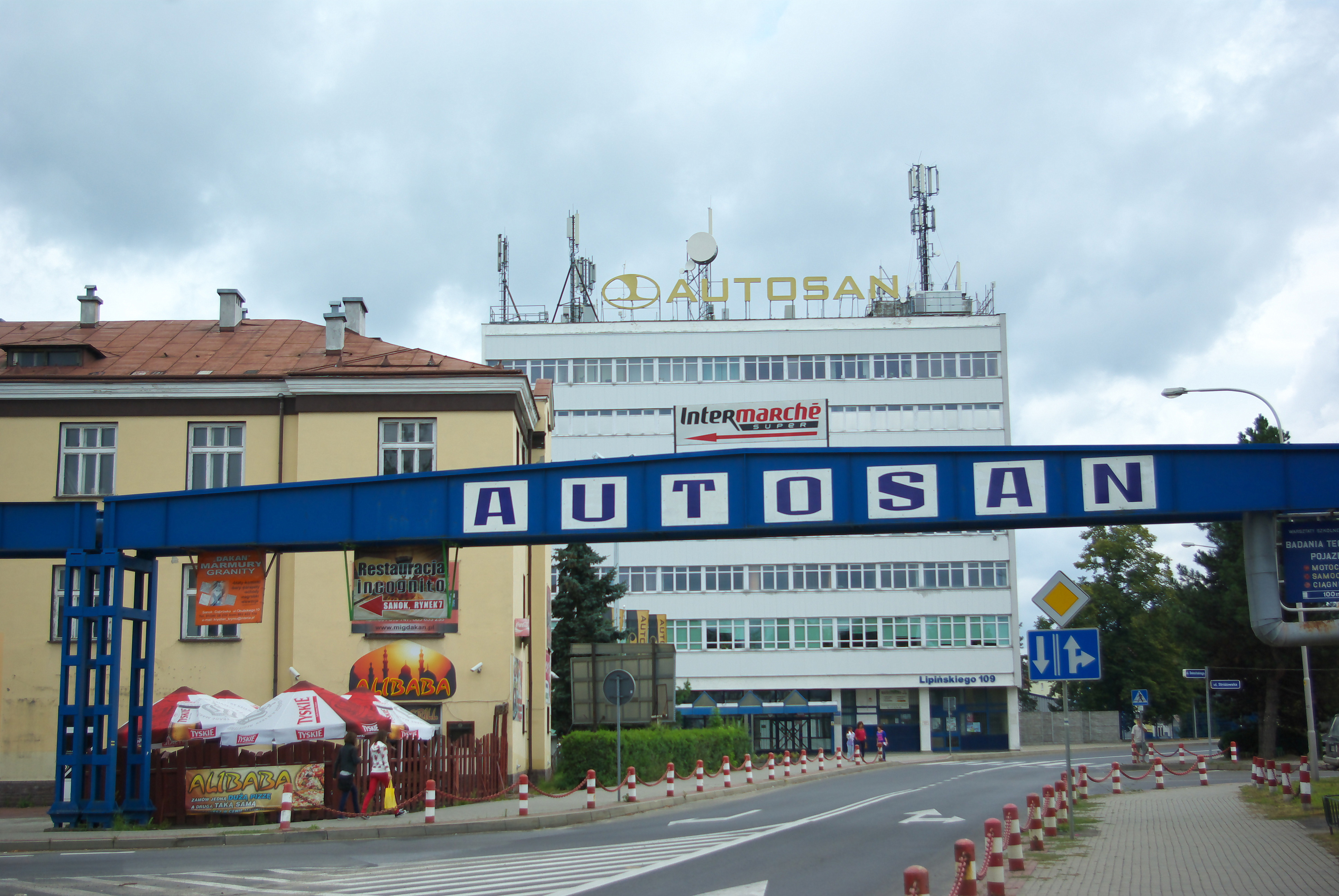 Lipińskiego Street in Sanok